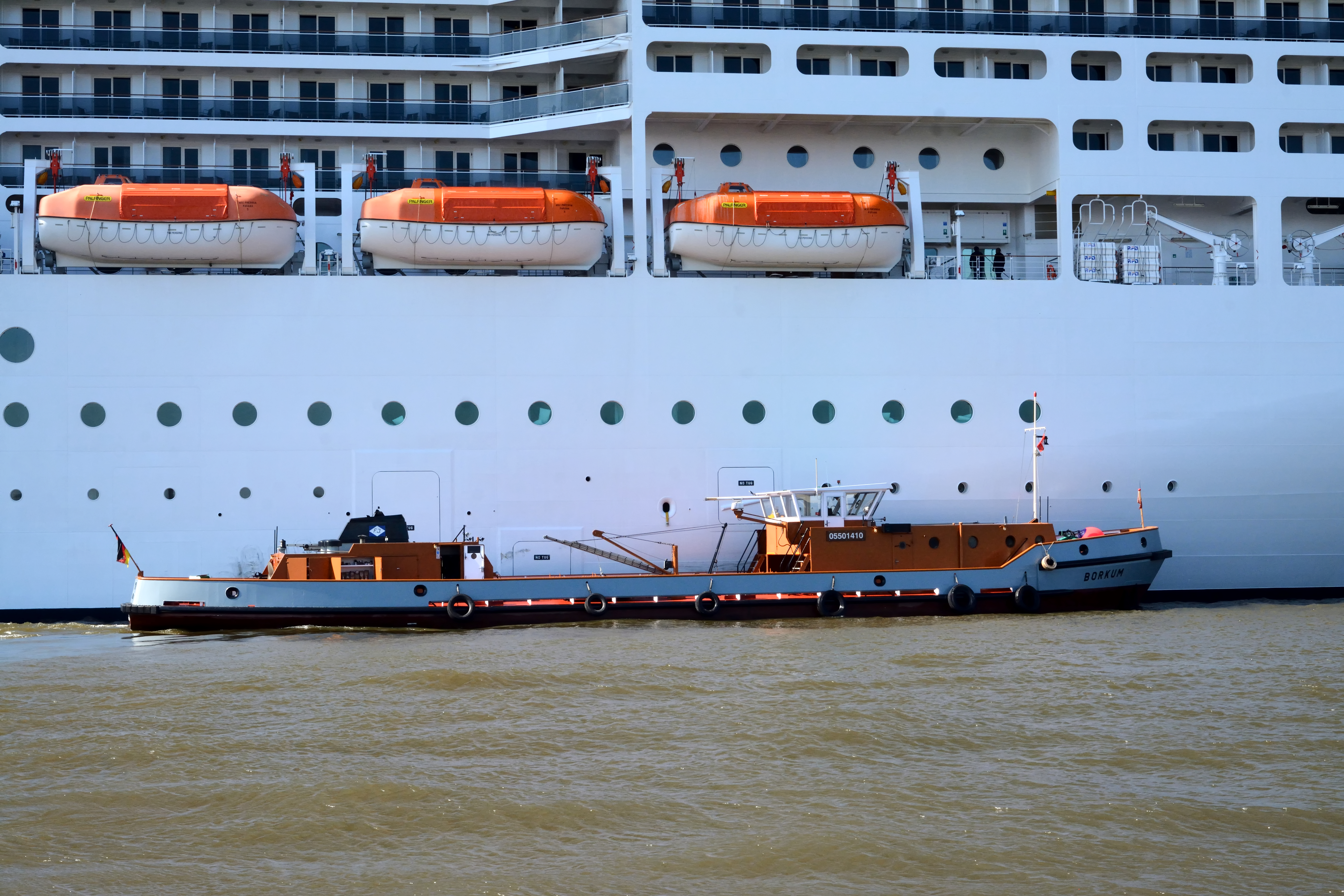 Impressionen eines Wochenendes in Hamburg mit dem Titel: Wikipedia:AhoiFotos der Barkassenfahrt am Samstag im Hamburger Hafen.